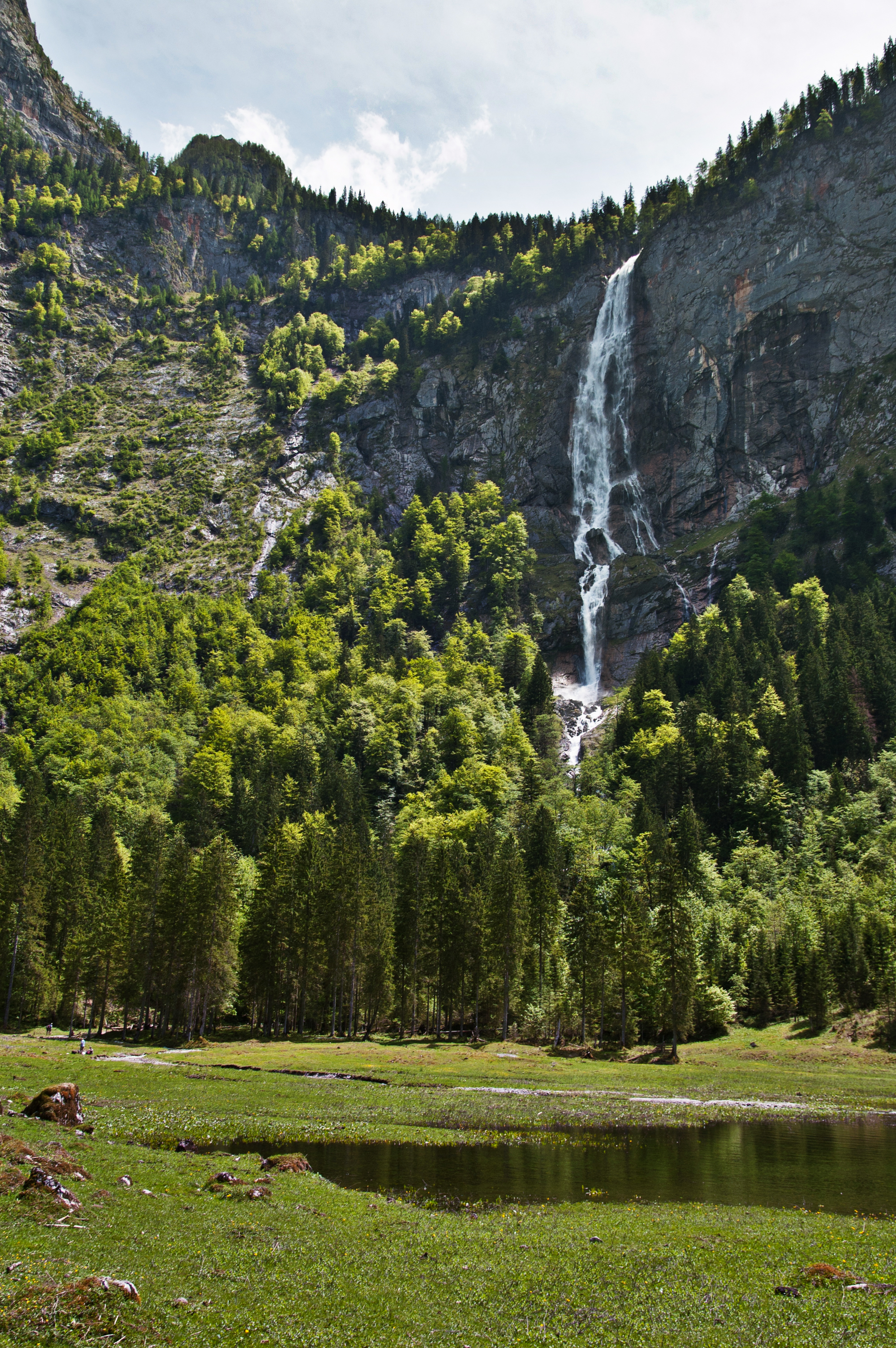 Der Röthbachwasserfall oberhalb der Fischunkelalm